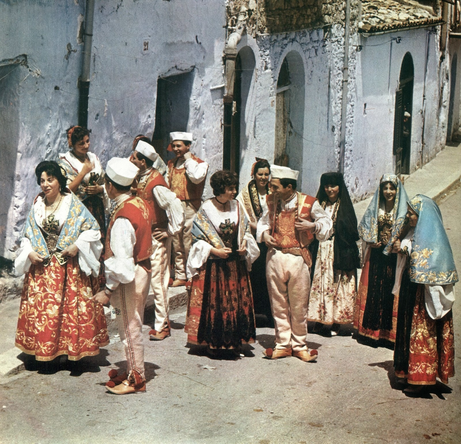 I costumi di Piana degli Albanesi. Dal volume del TCI "Conosci l'Italia", capitolo Il folklore, edito nel 1967.